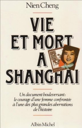 Vie et mort à Shanghai